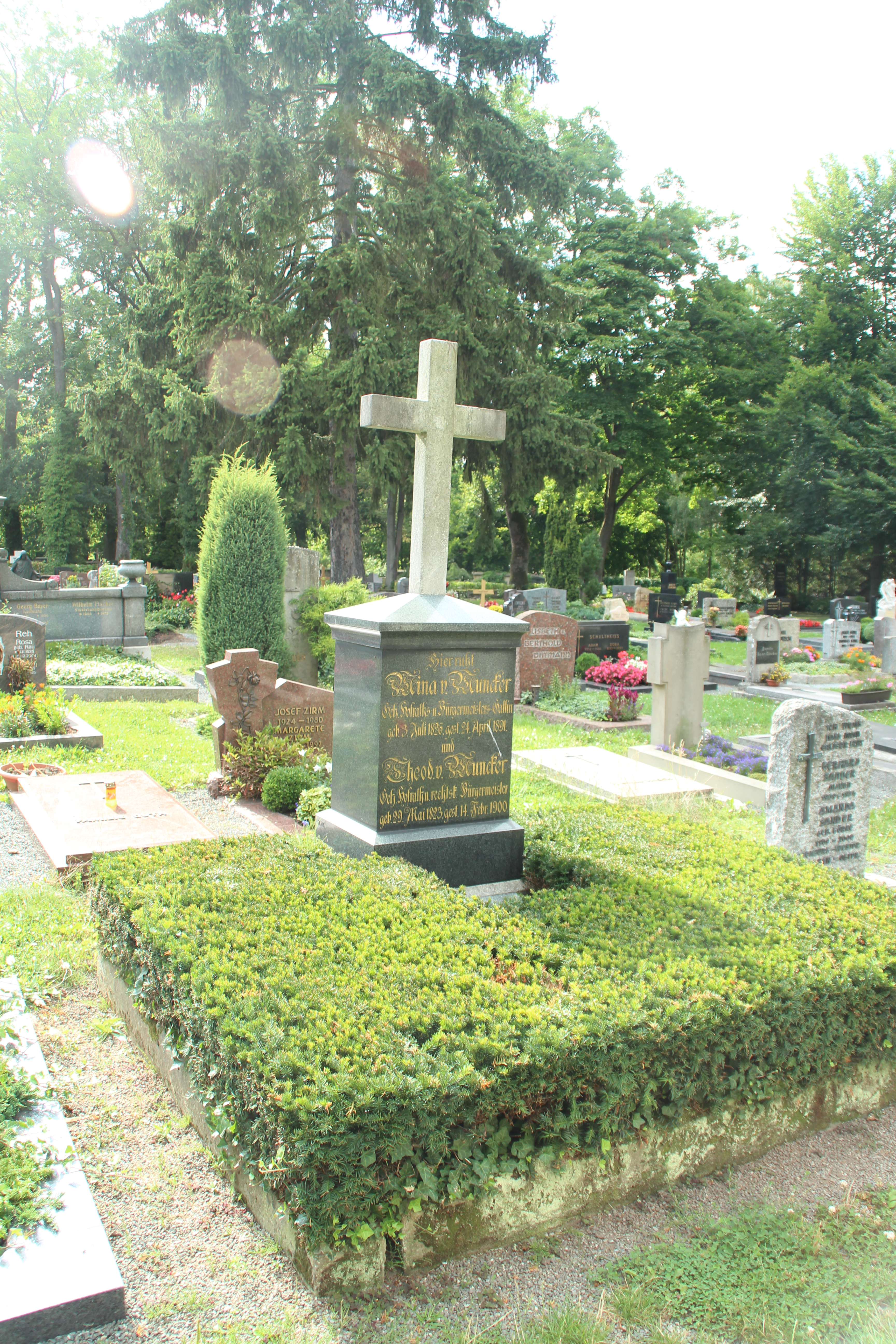 Grabmal der Familie Muncker auf dem Stadtfriedhof zu Bayreuth